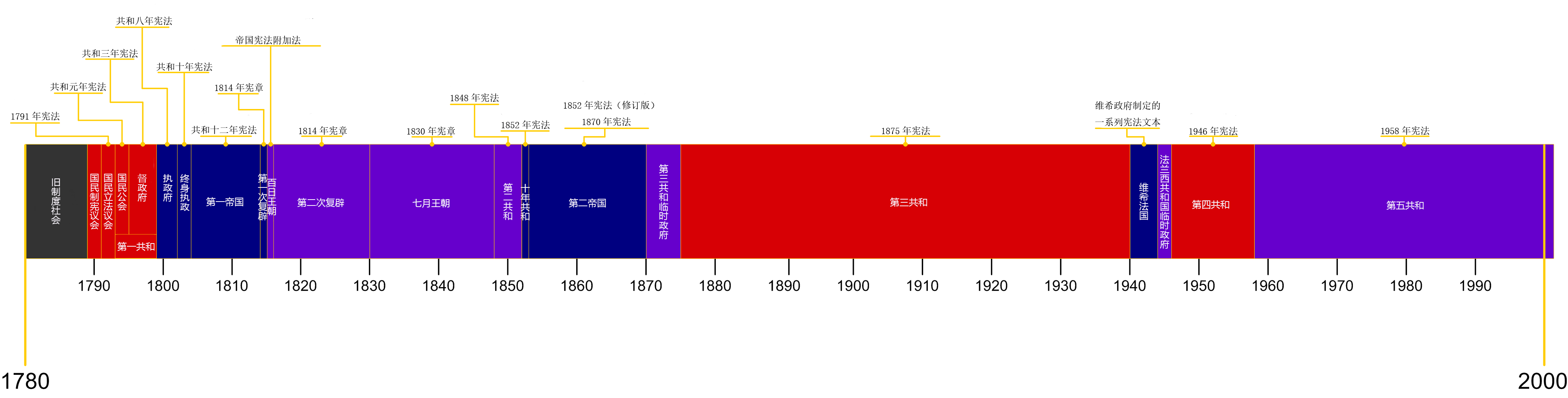 中文（中国大陆）: 法国的政治年表，标注了每个时期的政府形式以及实行的宪法，翻译自法语维基。翻译都是参考维基已有条目，未有的只有十年共和（拿破仑三世政变后还未称帝的时期），法语也没有相关条目。 原图注释： 蓝色代表行政权强势，紫色代表行政和立法相当，红色代表立法权强势。该图只是象征性概括了各个时代，不能有效说明不同统治间的细微变化过程。该年表是由Microsoft Visio制作，与法国的统治时期和宪法相关。 法国宪法